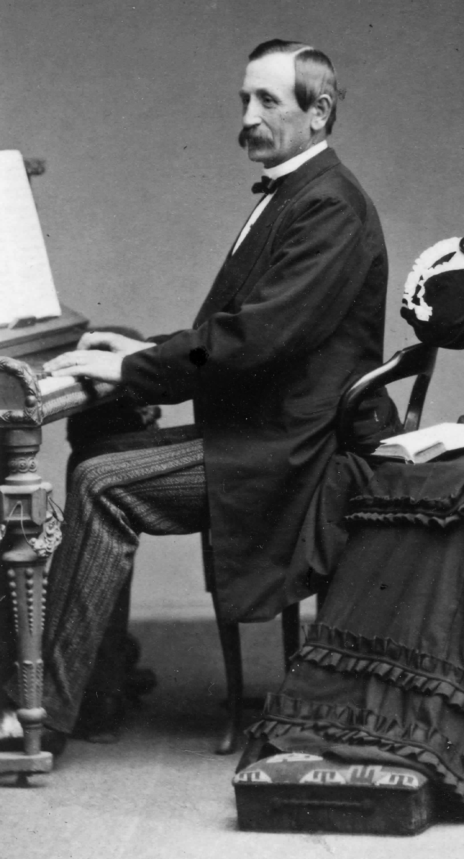 Wilhelm Lagercrantz, född 1825, död 1886.